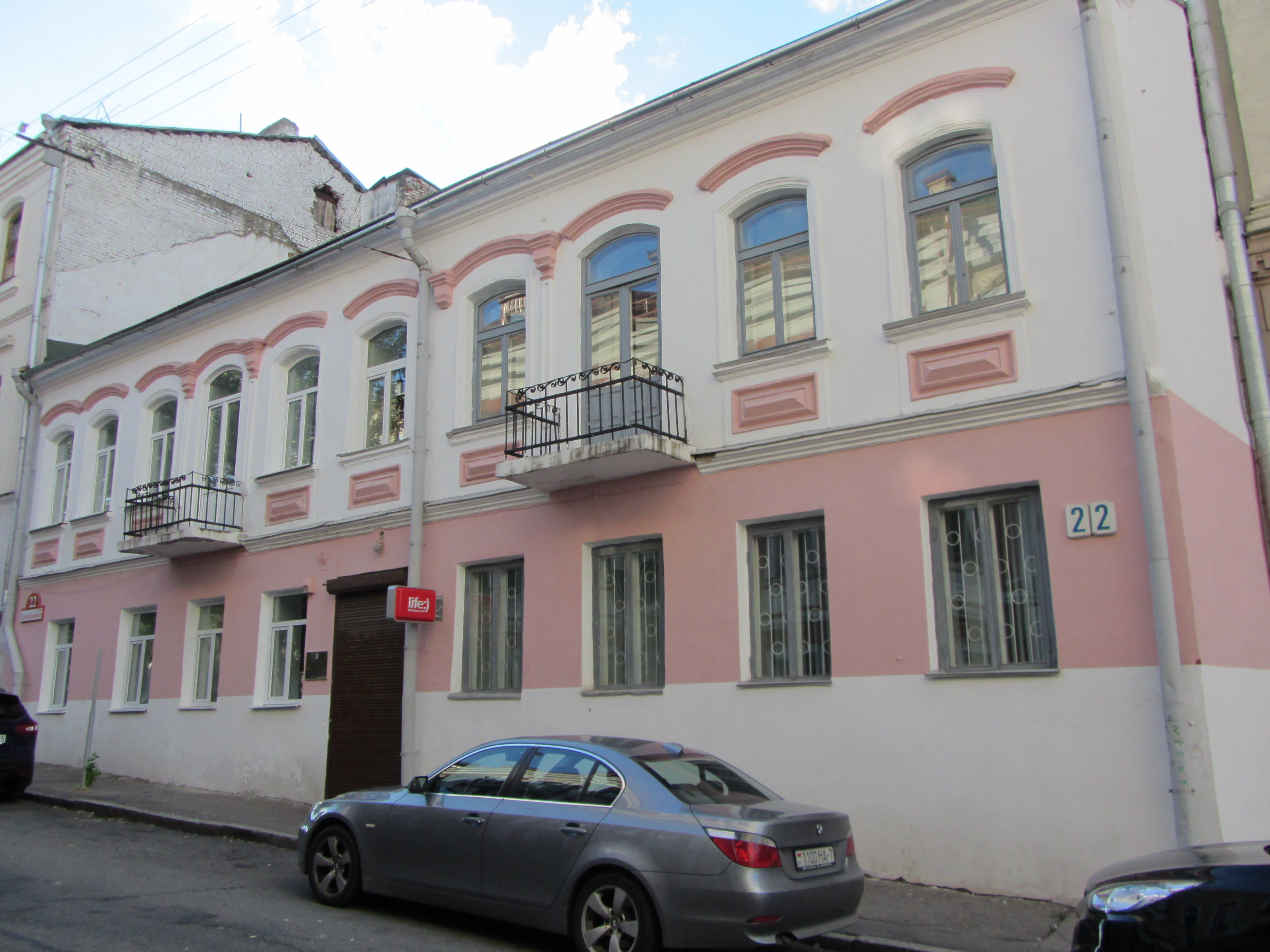 Беларуская (тарашкевіца): Вуліца Рэвалюцыйная, 22